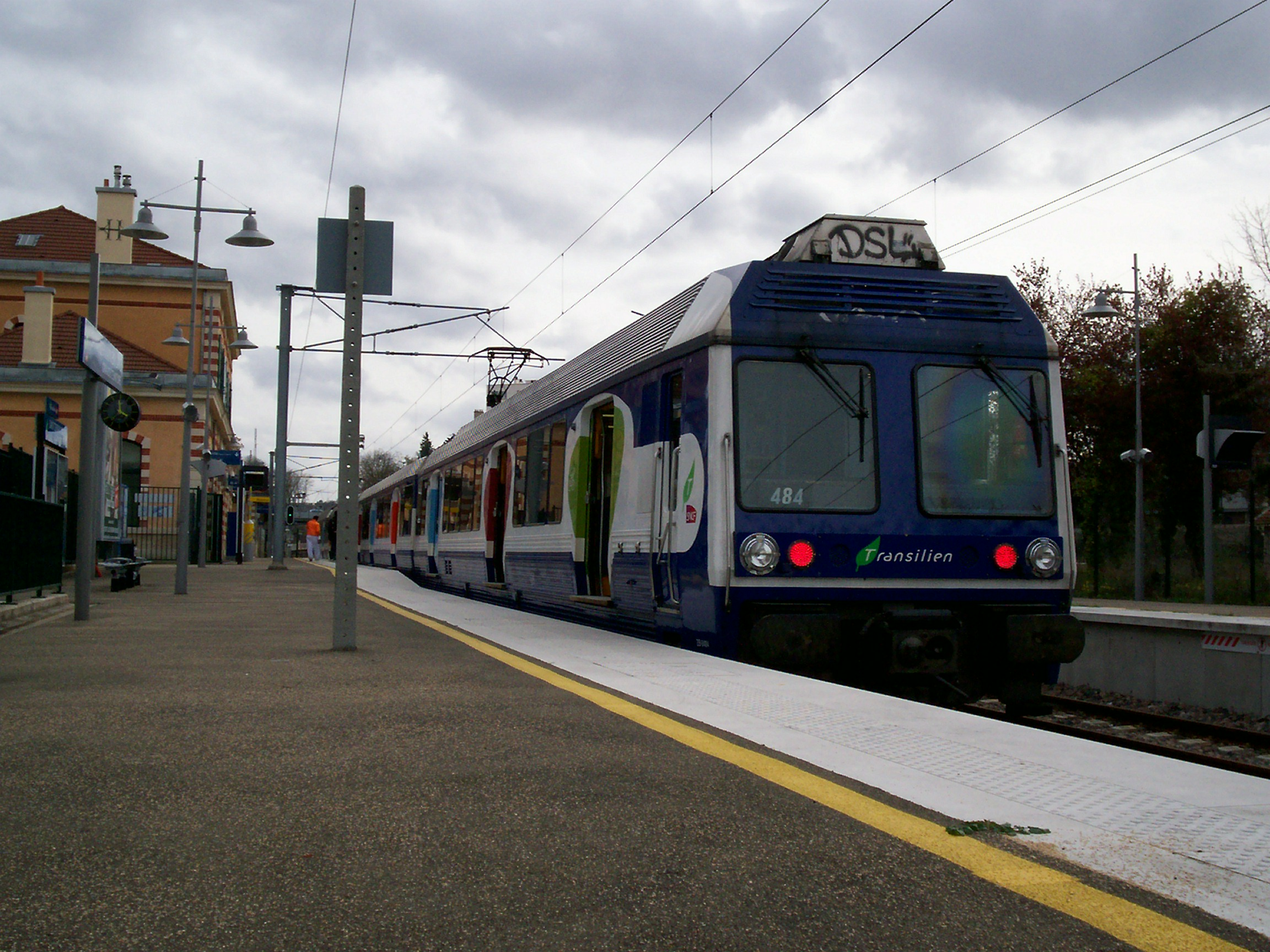 Troisième vue du train GCO "NOIS" en gare origine de Saint Germain GC